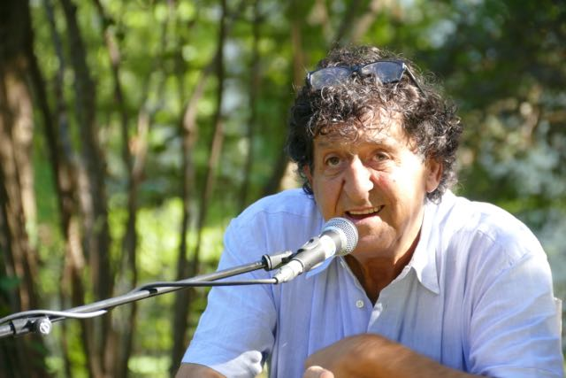 Robert Schindel stellte auf dem Erlanger Poetenfest 2015 seinen Lyrikband "Scharlachnatter" vor